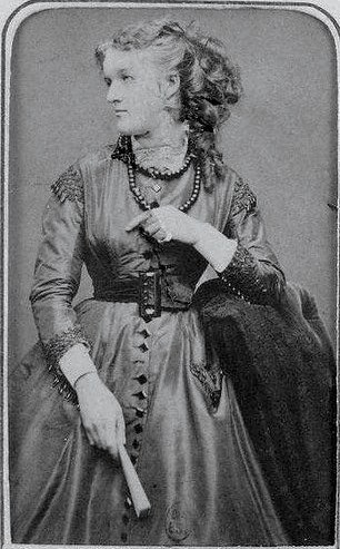 Надежда Ивановна Нарышкина, урожденная баронесса Кнорринг (1825-95).